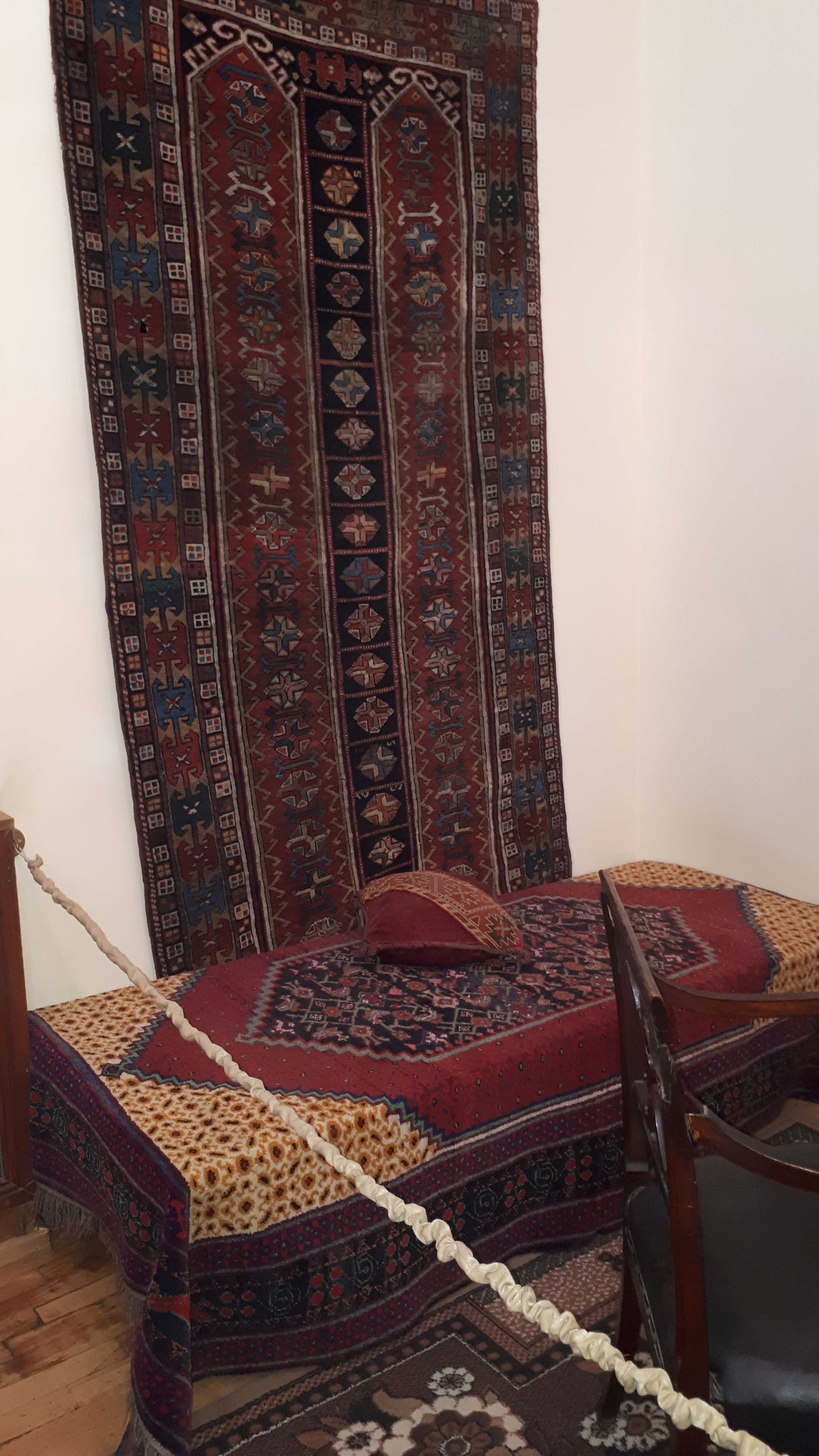 Օրբելի եղբայրների մայրիկի ննջասենյակը